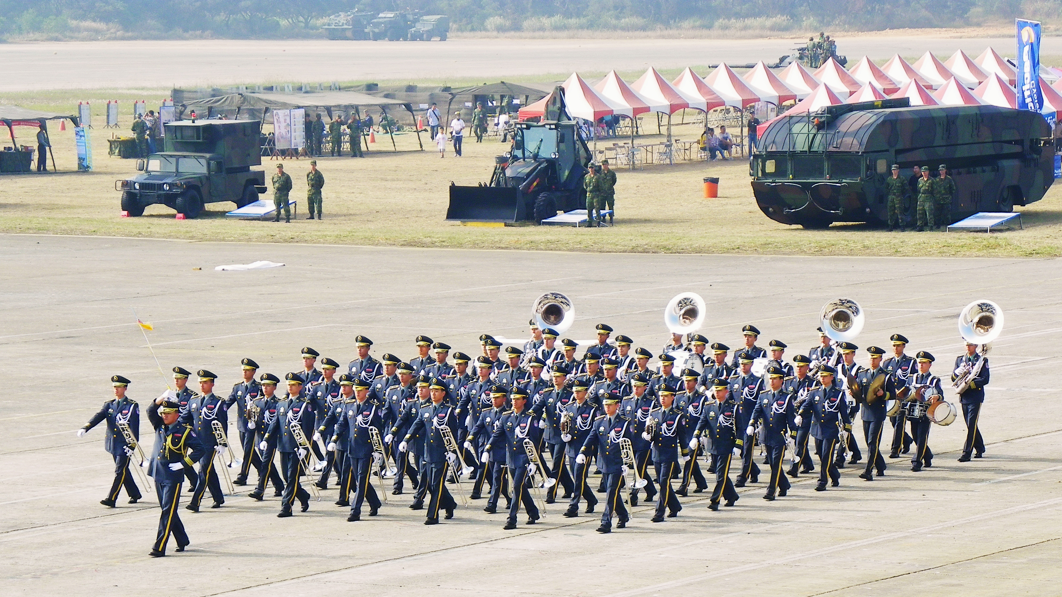 2011年陸軍湖口營區開放活動，開場表演通過中興臺前的陸軍樂隊。